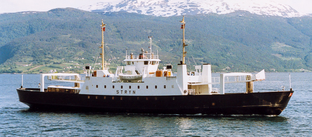 MF Stryn ved Hella